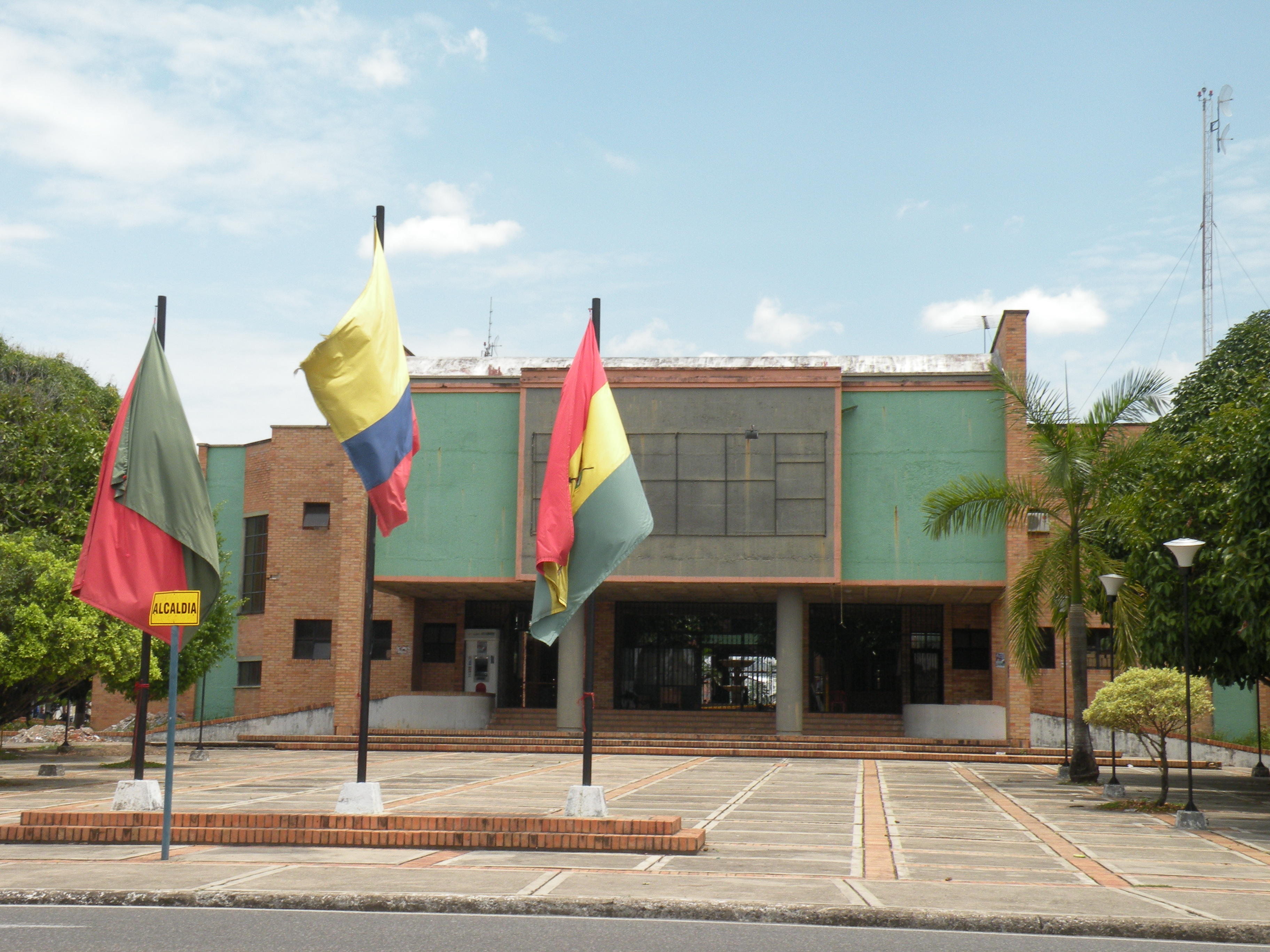 Parque Extremo